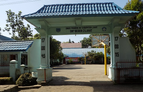 gerbang utama smp negeri 2 lahat